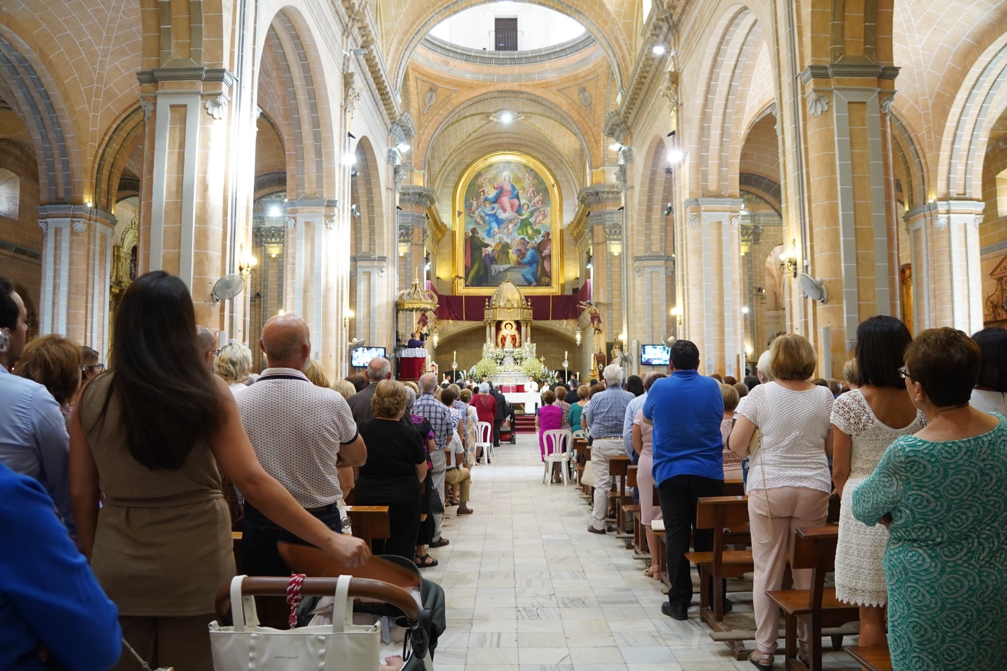 Iglesia Ntra. Sra. de la Granada